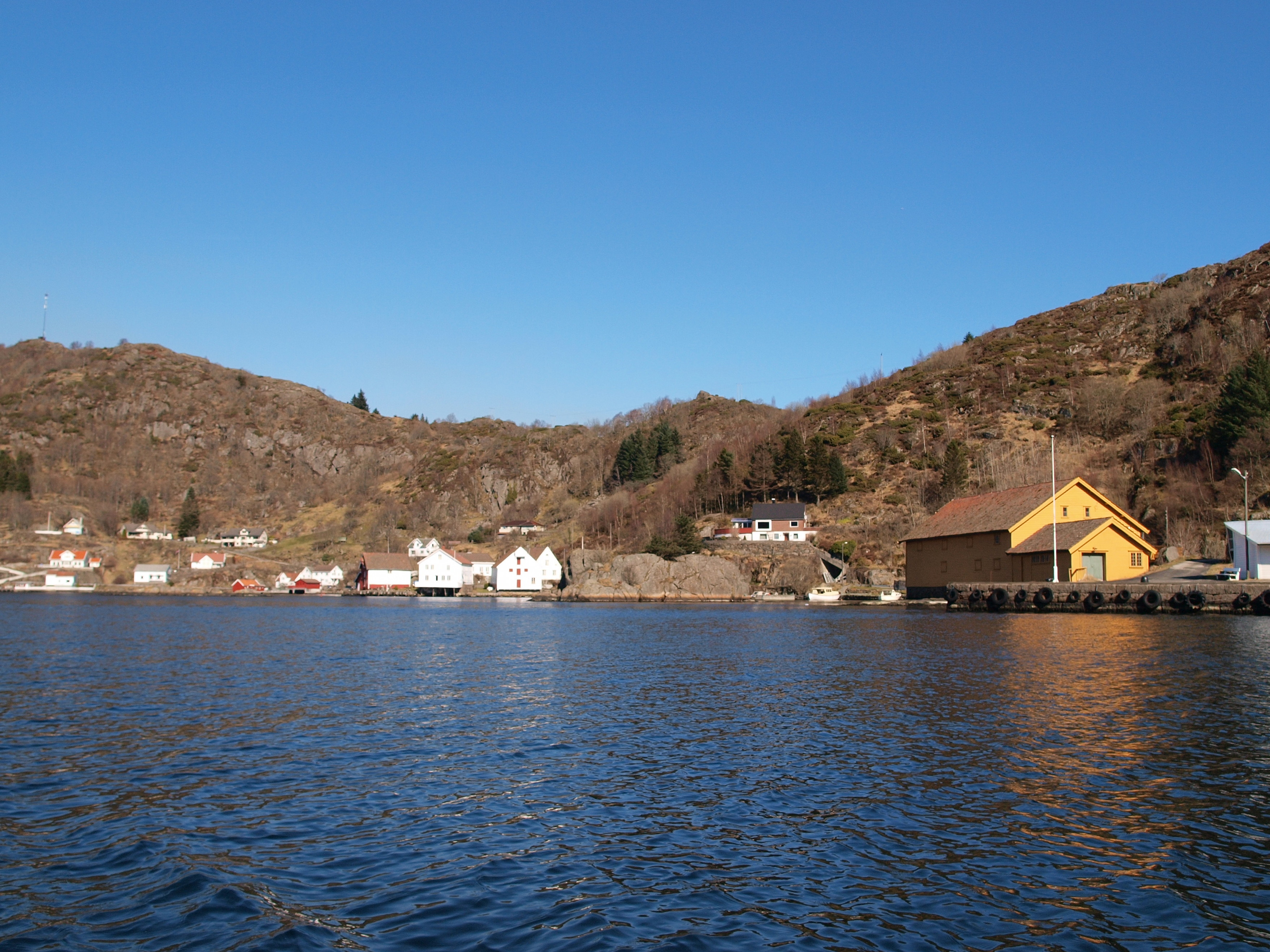 Den østlige delen av Rekefjord var en del av Sogndalstrand ladested. Fra venstre verneverdig trehusbebyggelse i Åve, Tollpakkhuset og Dampskipskaien.